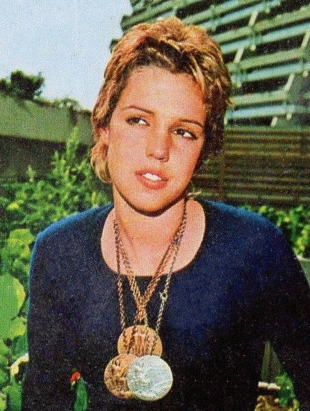 CAMPIONI dello SPORT 1973/74-Figurina n.228- CALLIGARIS - NUOTO -Rec